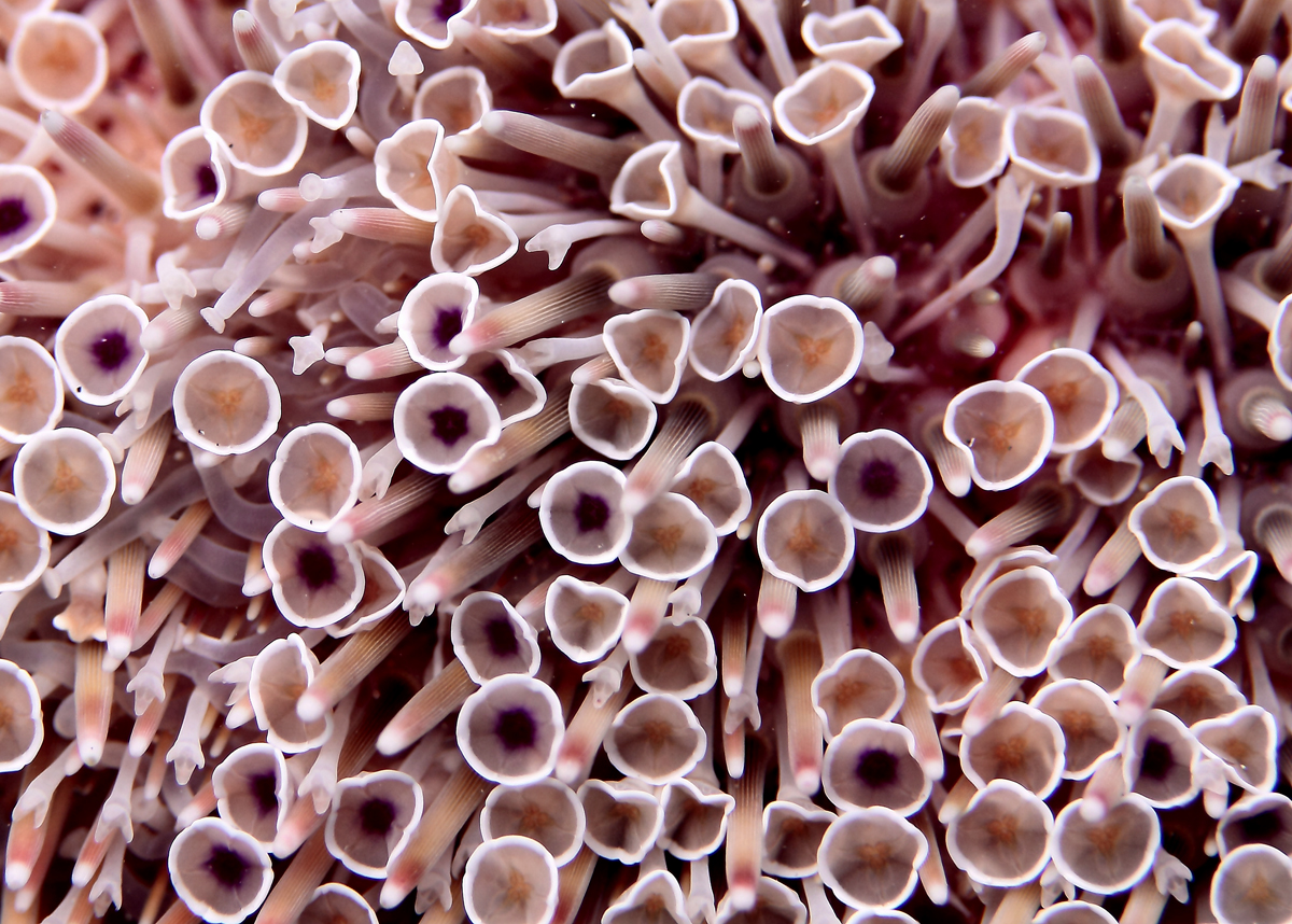 Gros plan sur les pédicellaires d'un oursin-fleur (Toxopneustes pileolus).